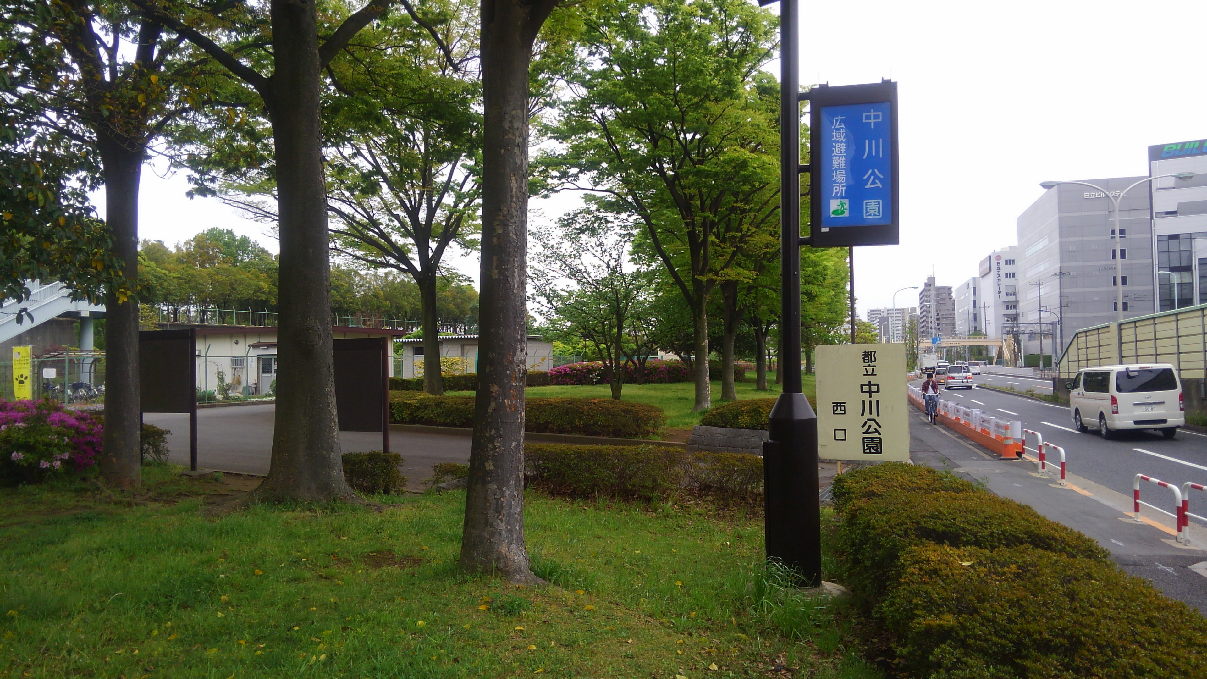 都立中川公園西口